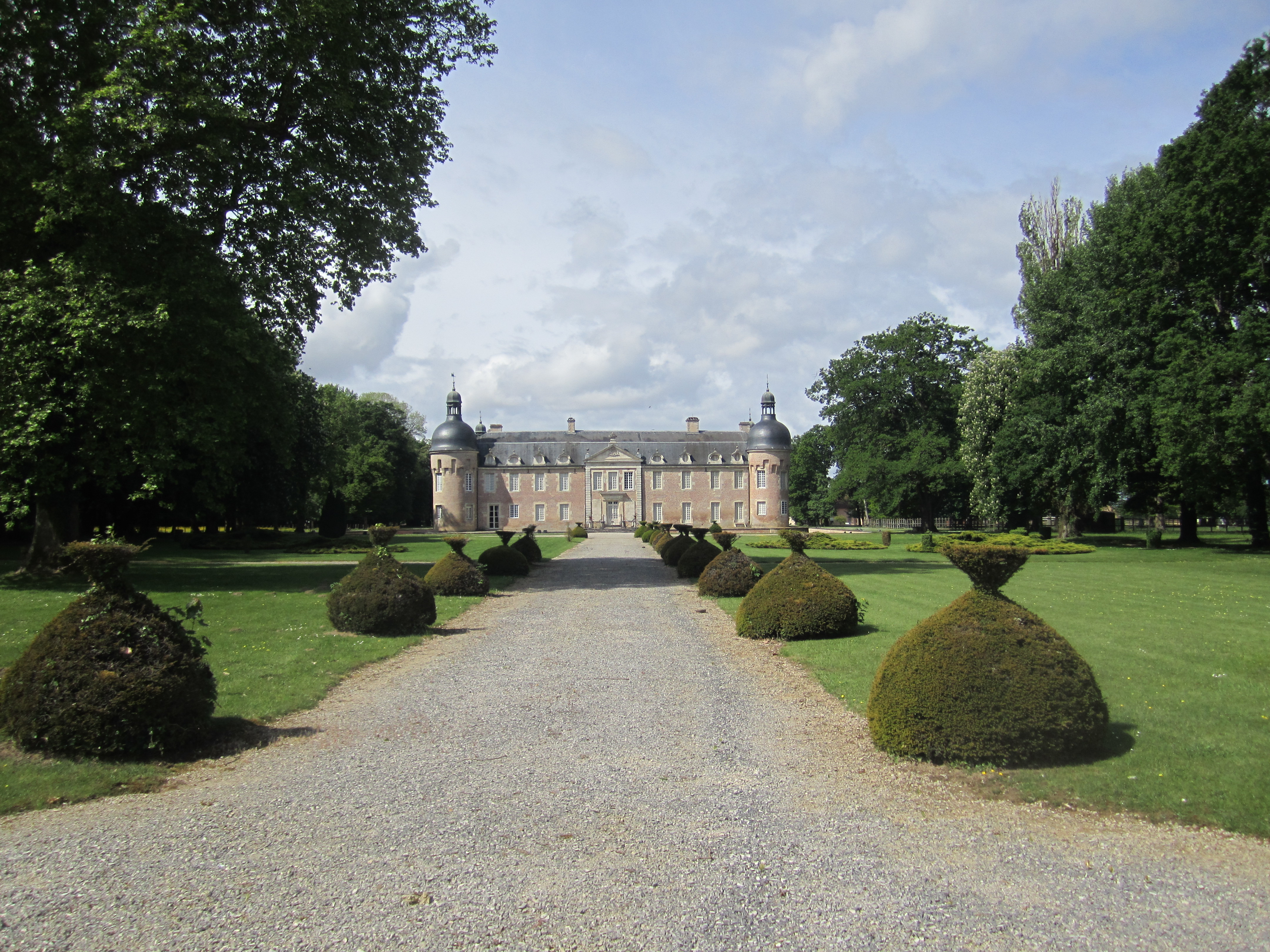 kasteeel Pierre-de-Bres